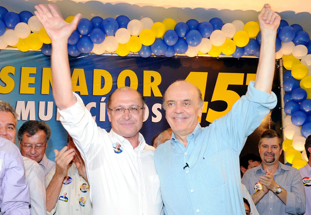 Geraldo Alckmin e José Serra